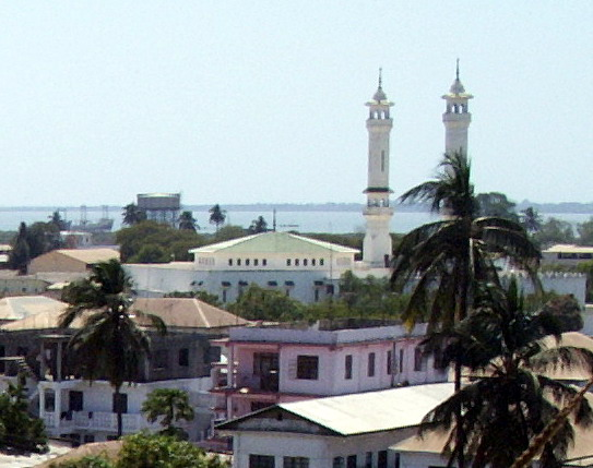 King Fahad-Moschee in Banul